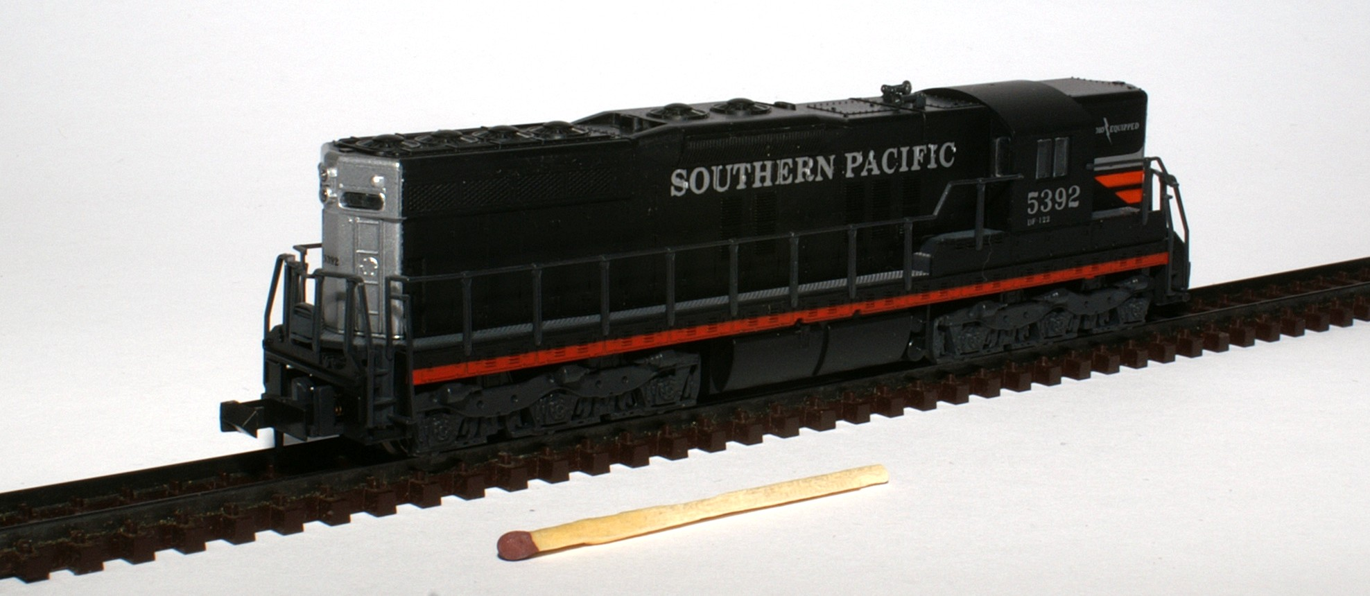 Modelleisenbahn der Spur N, abgebildetes Modell: EMD Sd 9